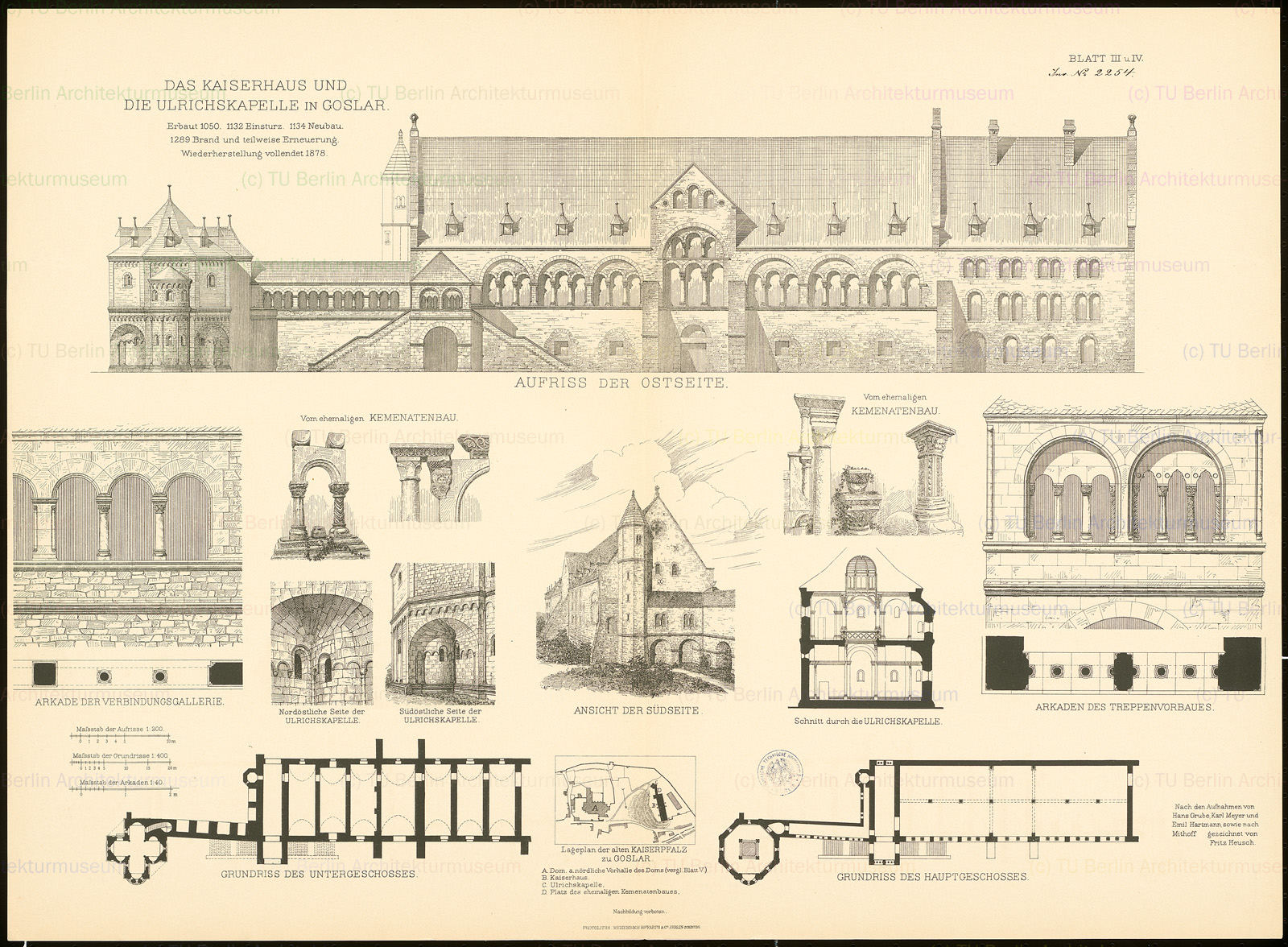 Kaiserpfalz Goslar, Architekturzeichnungen 1875